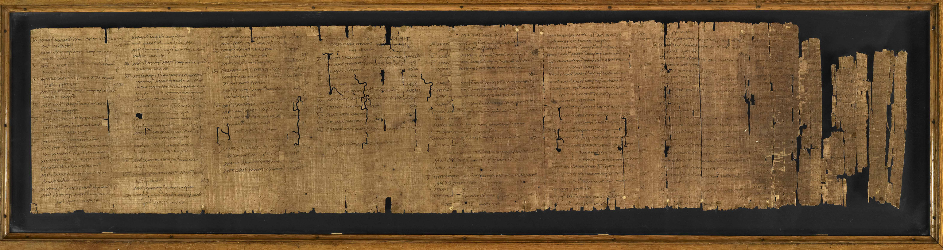 Constitution of Athens ( Ἀθηναίων Πολιτεία )